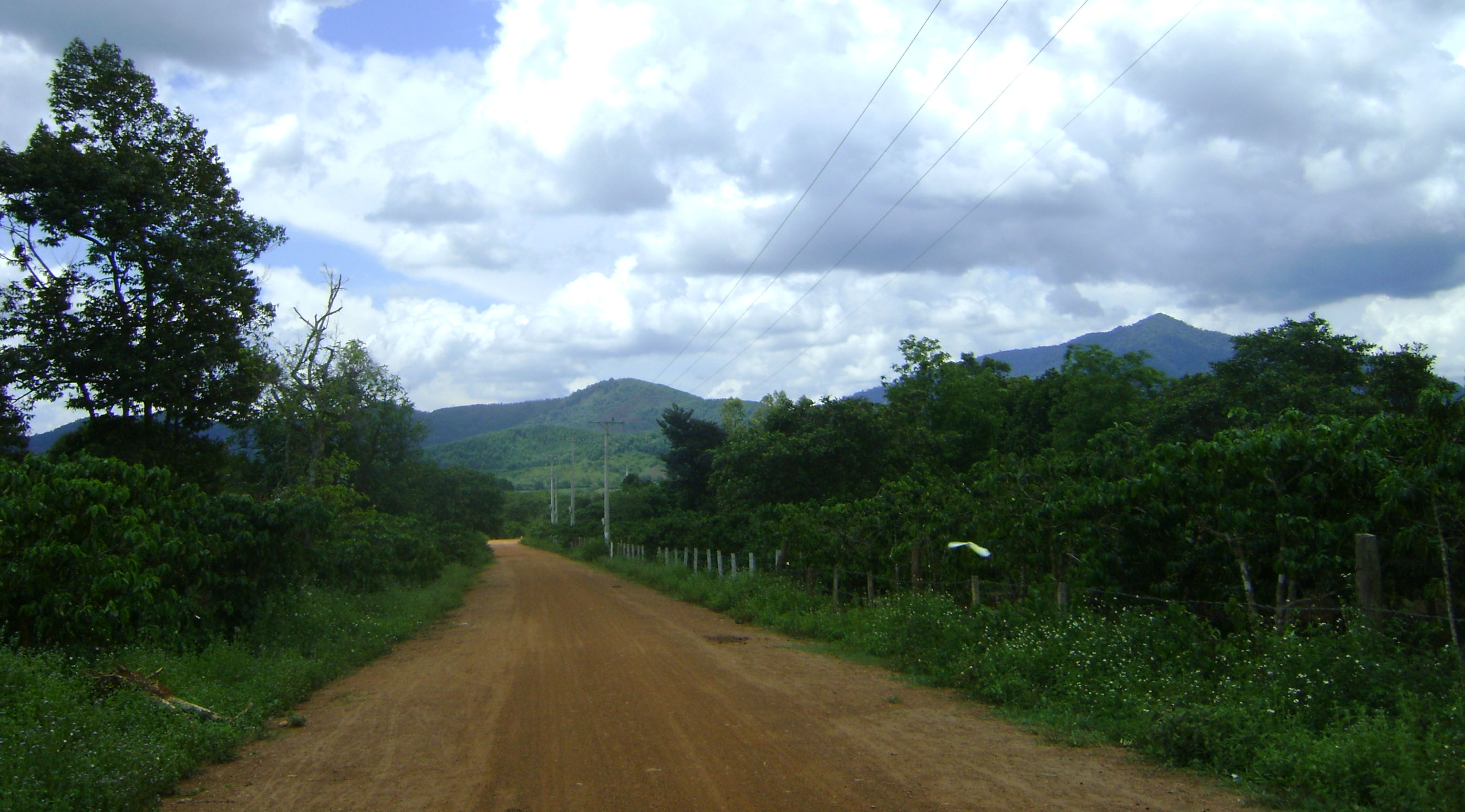 xã Cư Jang